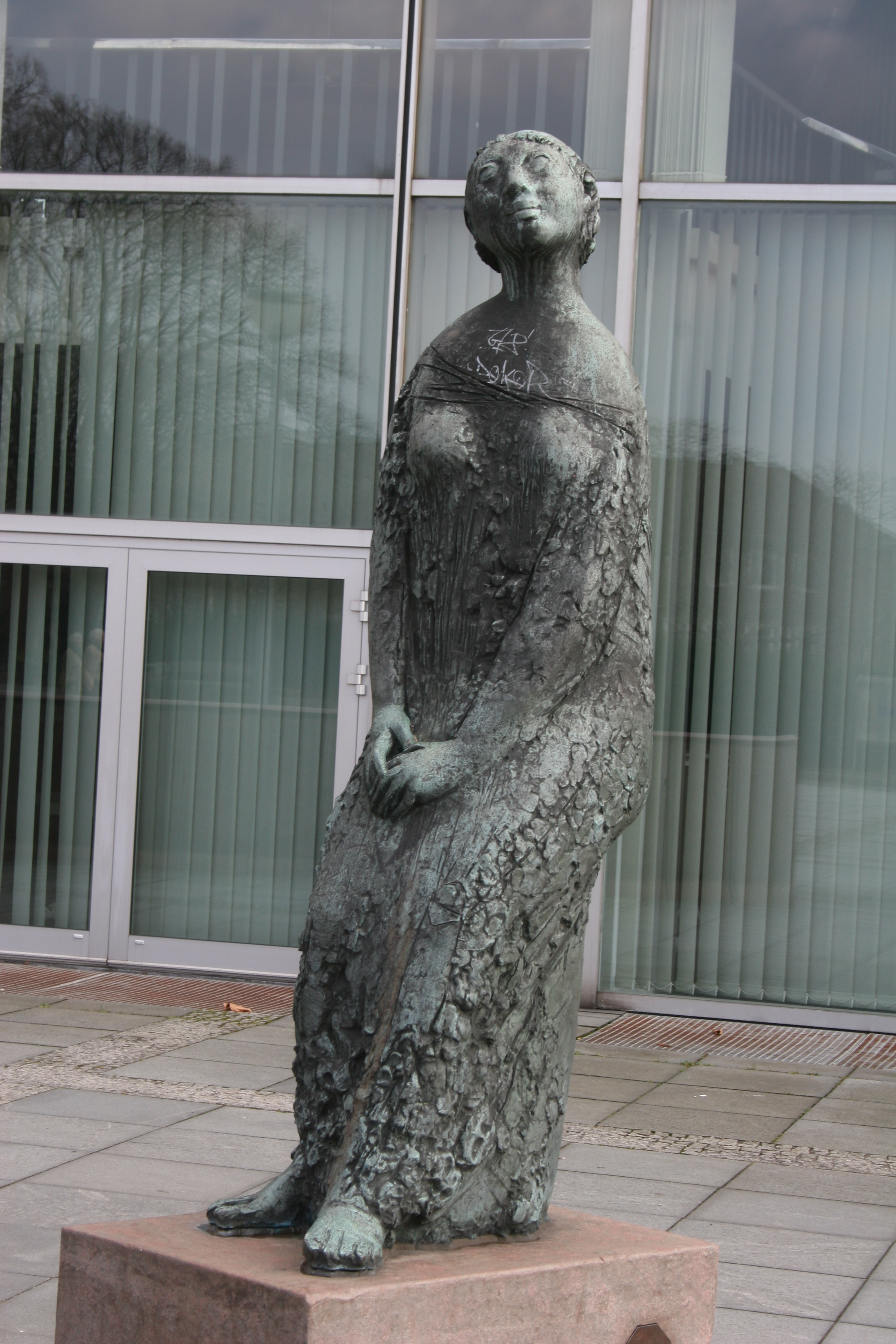 Gustav Seitz: Große Lauschende 1968, Bronze 200 cm, Werkverzeichnis Grohn Nr. 182. Germany, Kiel.